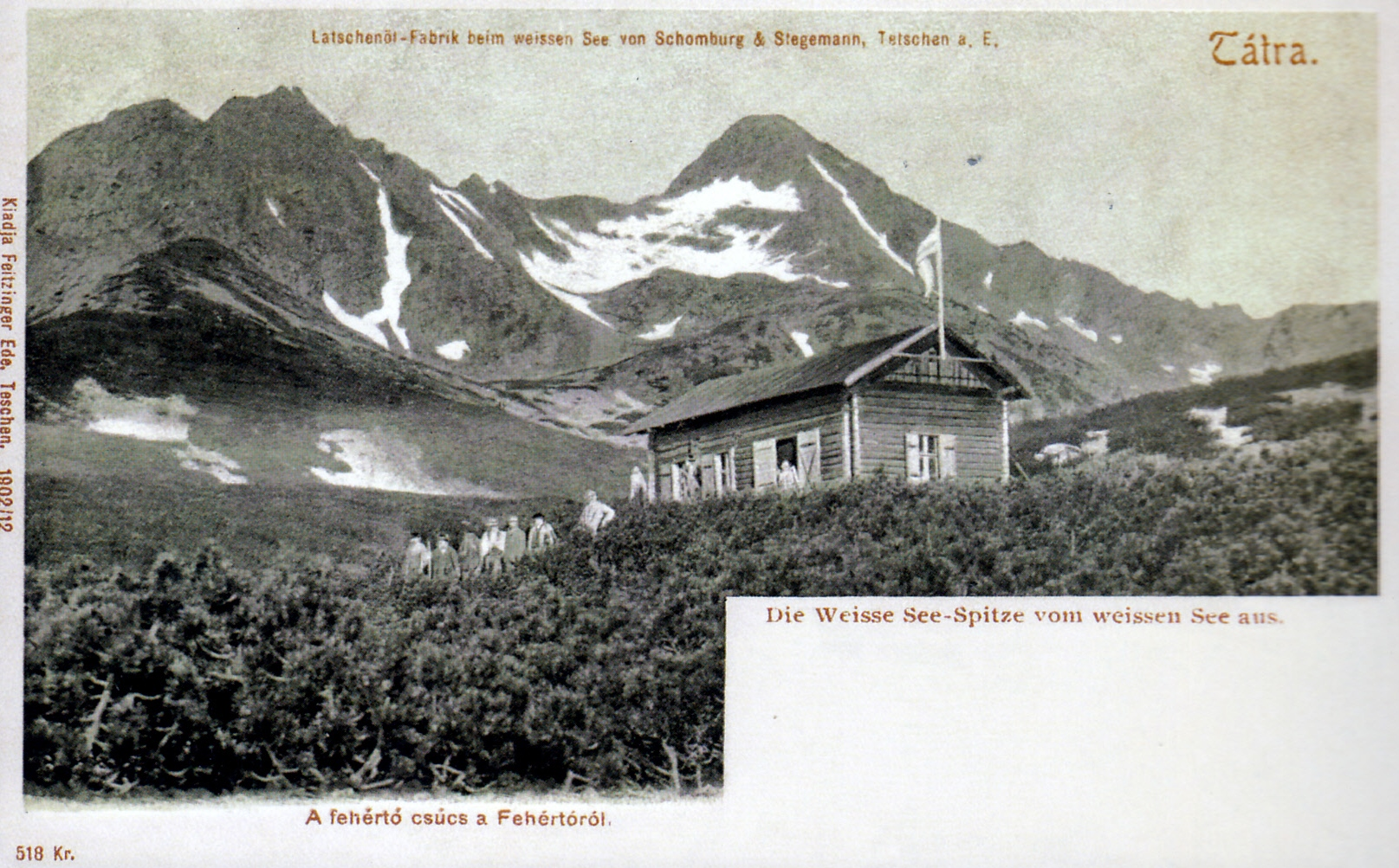 V Doline Bielych plies vo Vysokých Tatrách postavili dom, v ktorom vyrábali olej z kosodreviny.